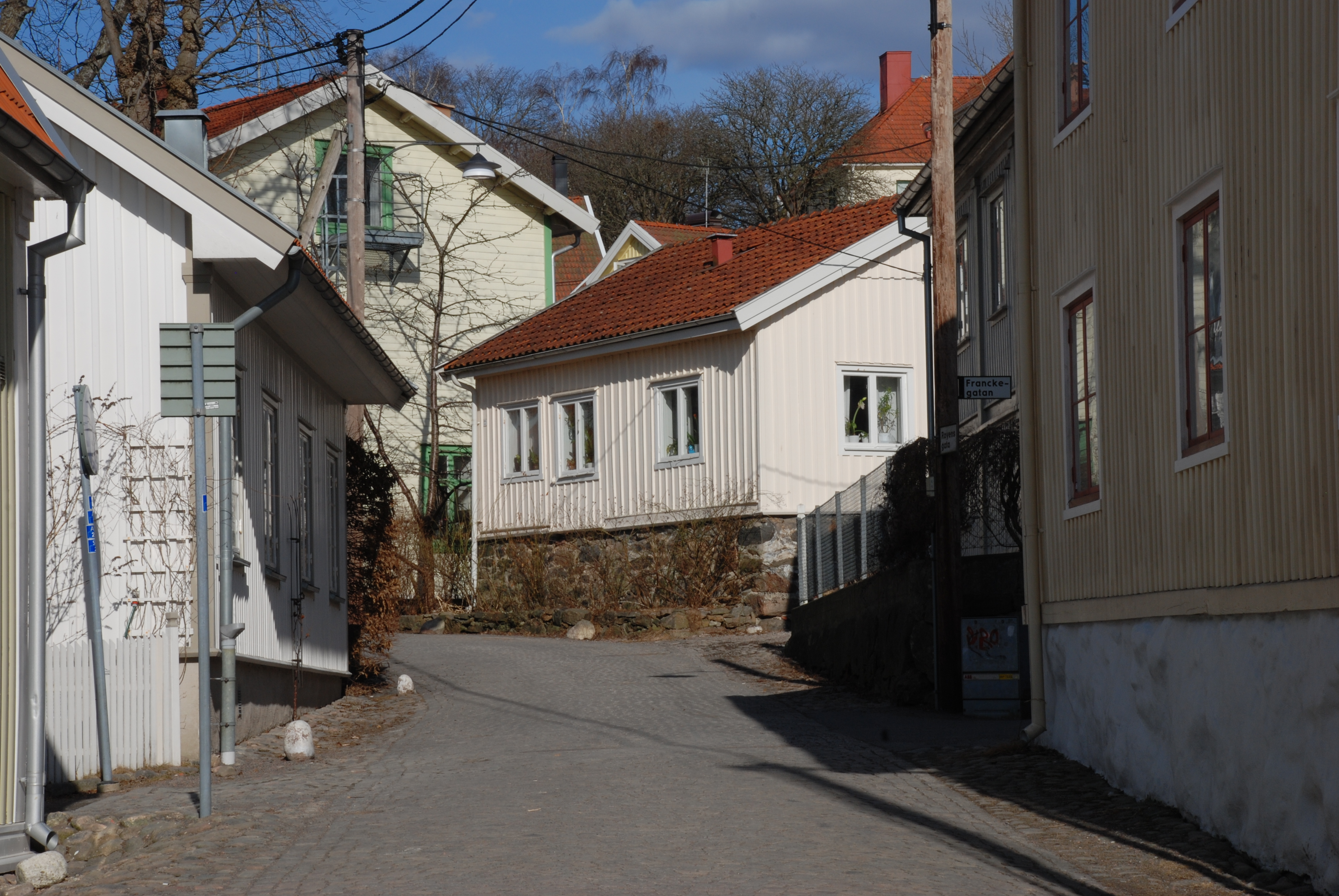 Royens gata i Mölndals Kvarnby.